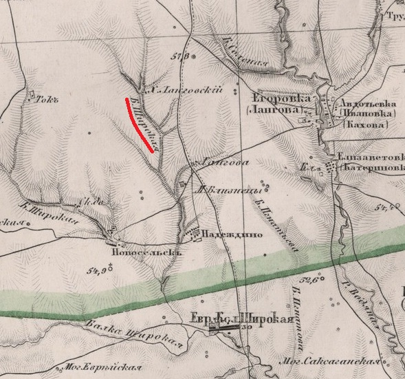 Верхів'я балки Широкої в районі сучасного с. Широкого (фрагмент карти)